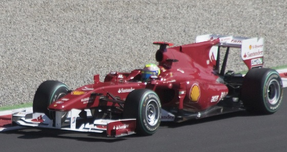 Massa [2010] Monza F1